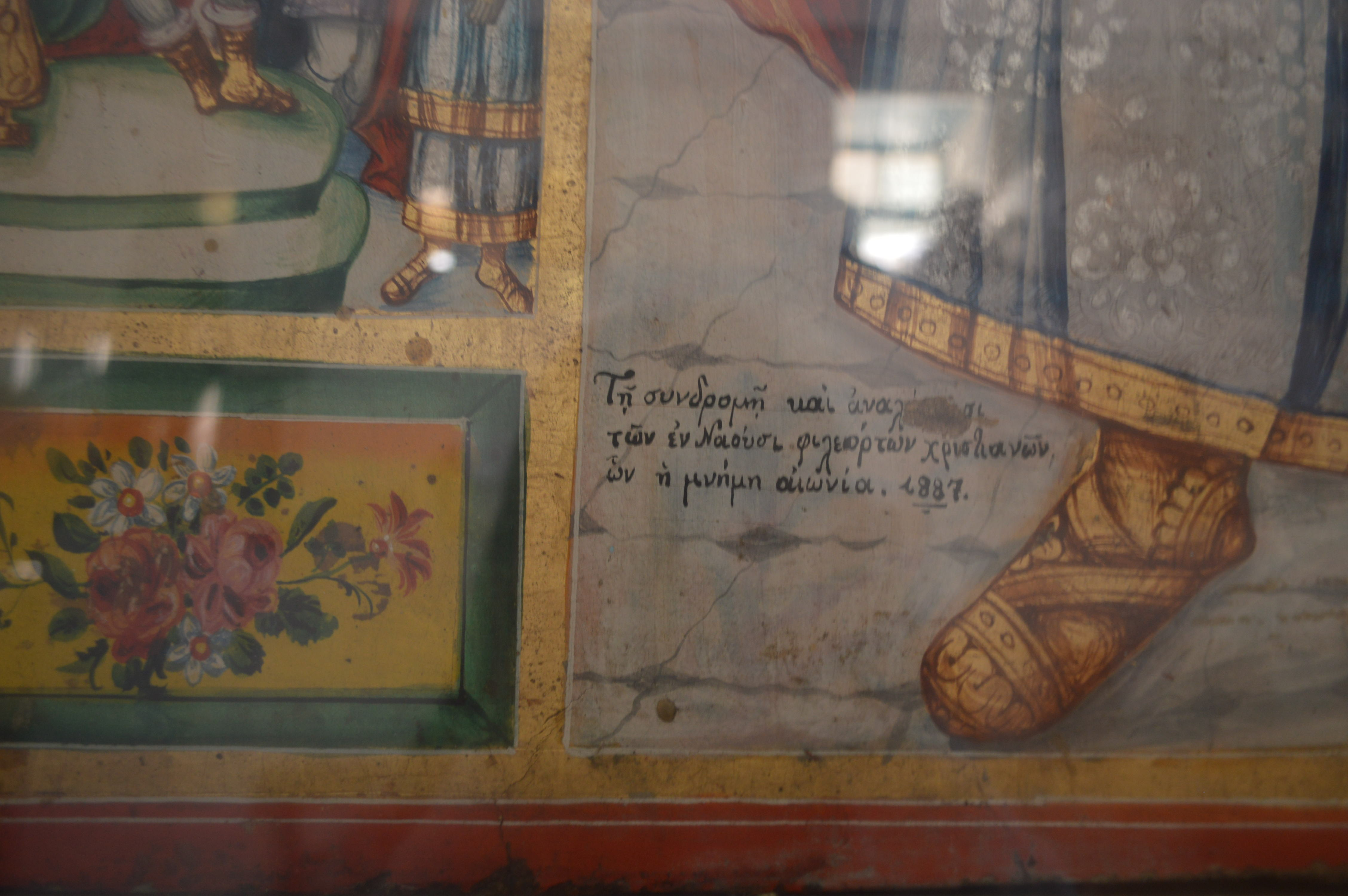 Εσωτερικό του Ναού (19)